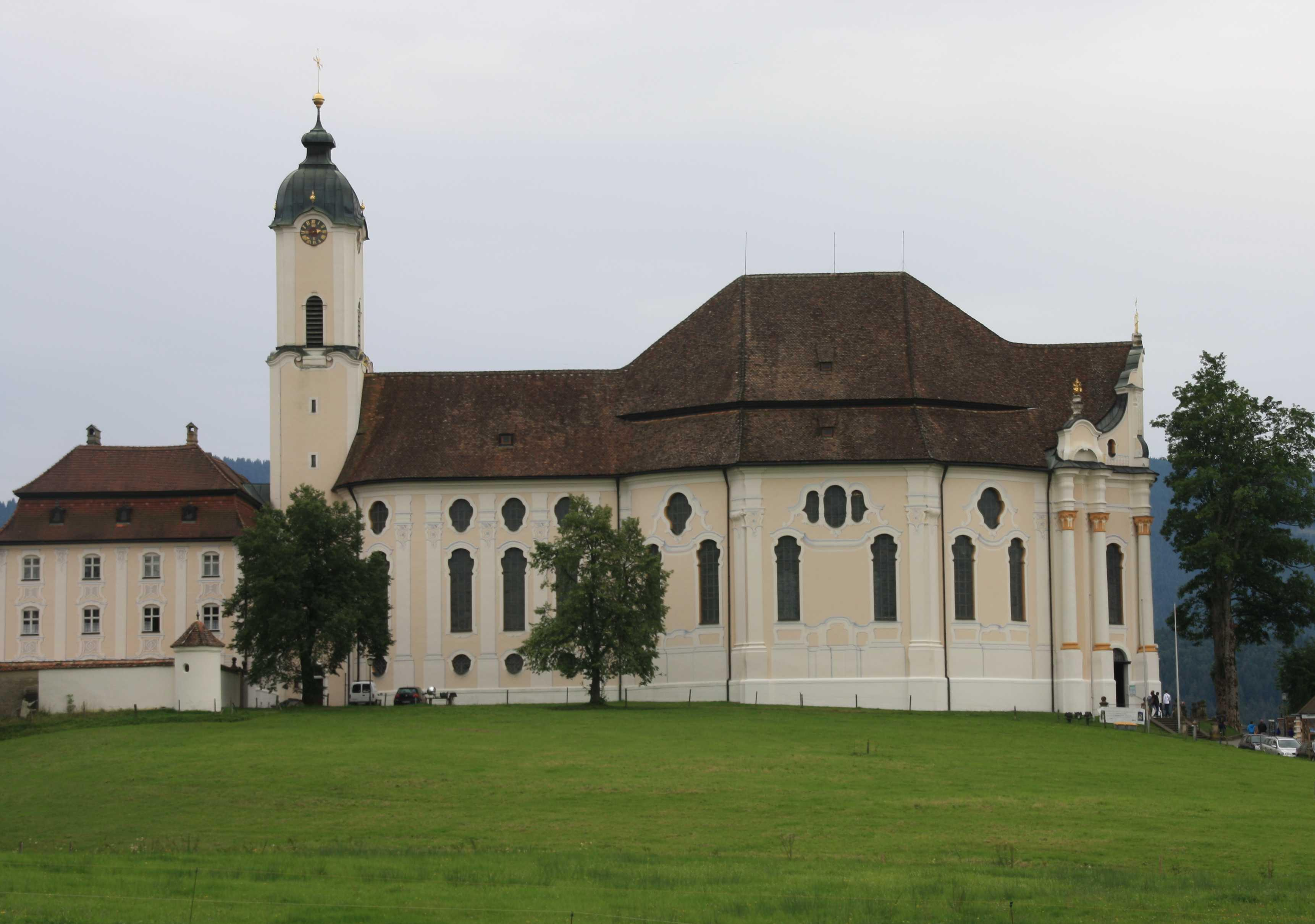 Wieskirche von außen